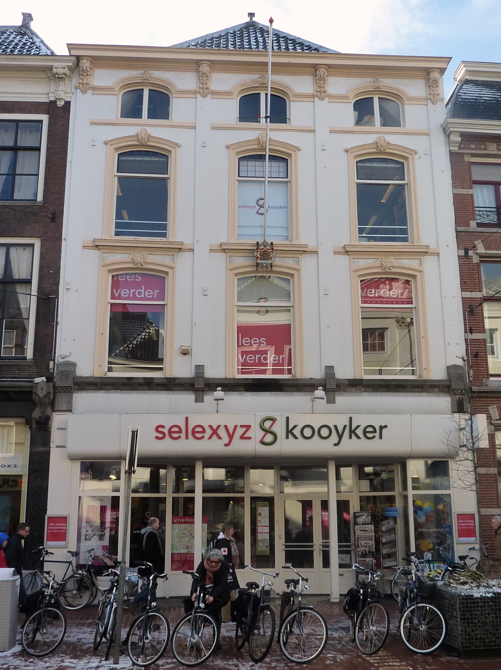 Leiden - Breestraat 93 - Selexyz - Kooyker